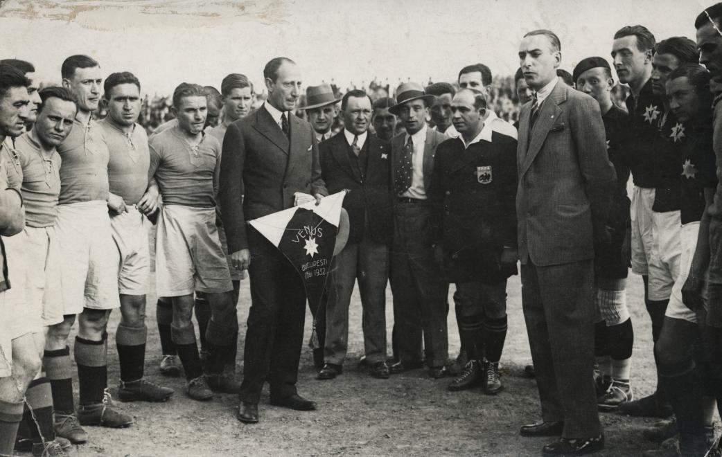 Venus Stadion (ma a Parcul Venus van a helyén), a felvétel a Bocskai FC - Venus București 2:1 (0:1) labdarúgó mérkőzés alkalmával készült, 1932. május 1-én. Balra a házigazdáktól kapott zászlóval Sajó István építész, a Bocskai FC társelnöke.